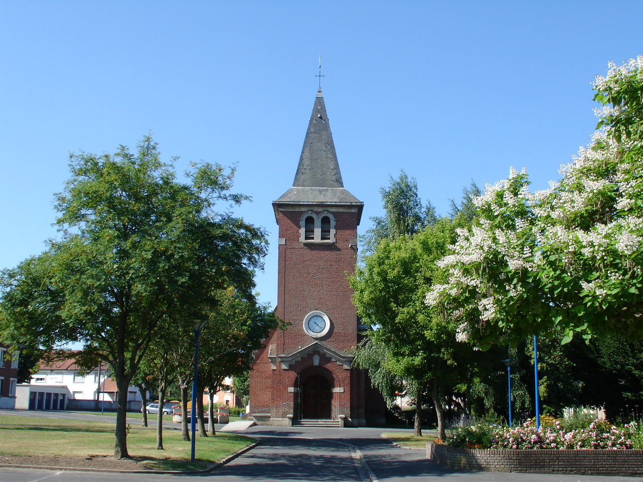 Église de Beaurains